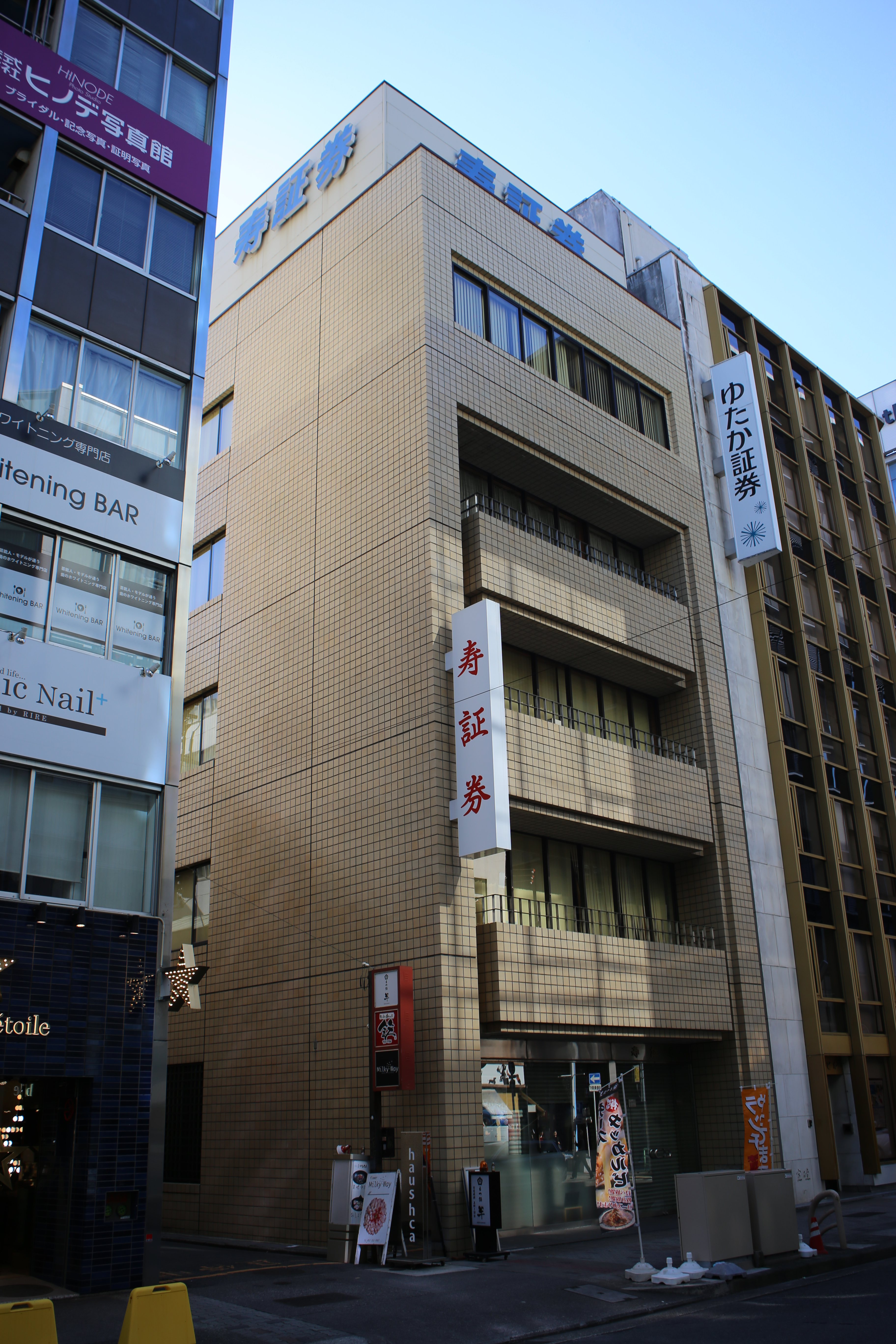 名古屋市中区栄三丁目の寿証券本社